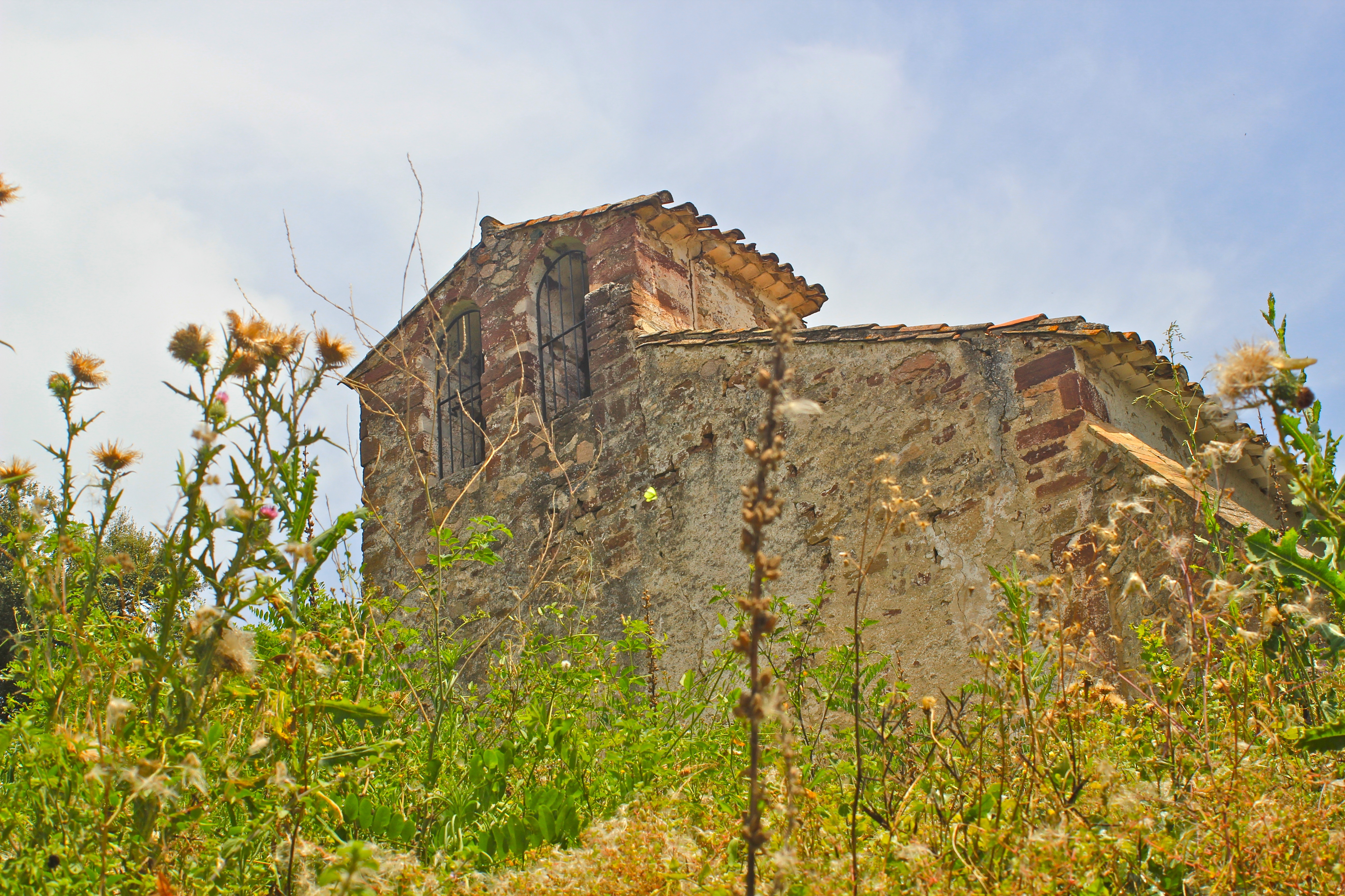 Sant Cristòfel de Monteugues